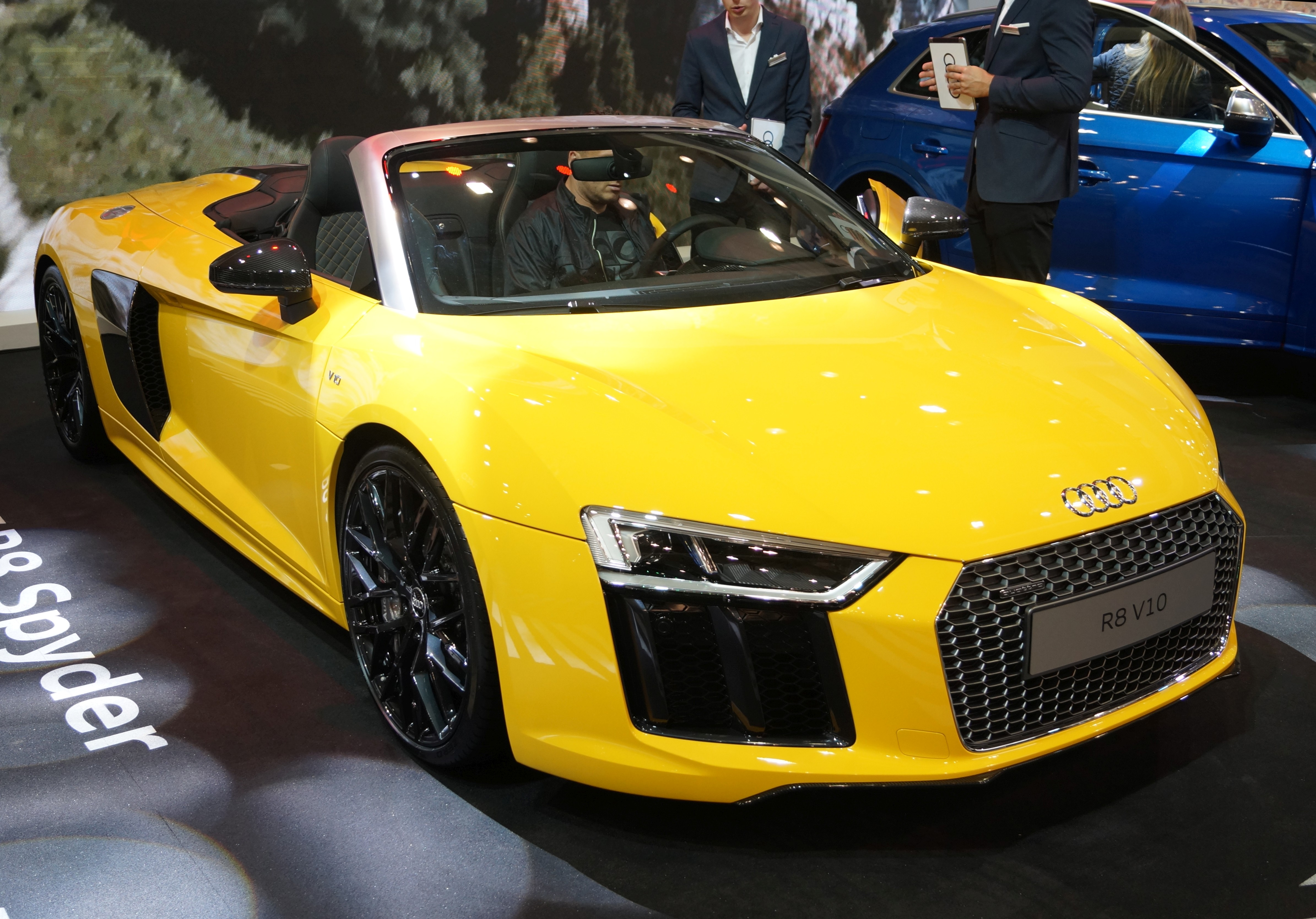 Prawy przód Audi R8 Spyder na Motor Show Poznań 2017.